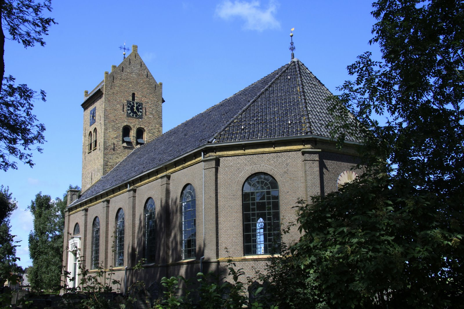 De hervormde Laurentiuskerk in Folsgare gemeente Sûd West Fryslân in de provincie Friesland.